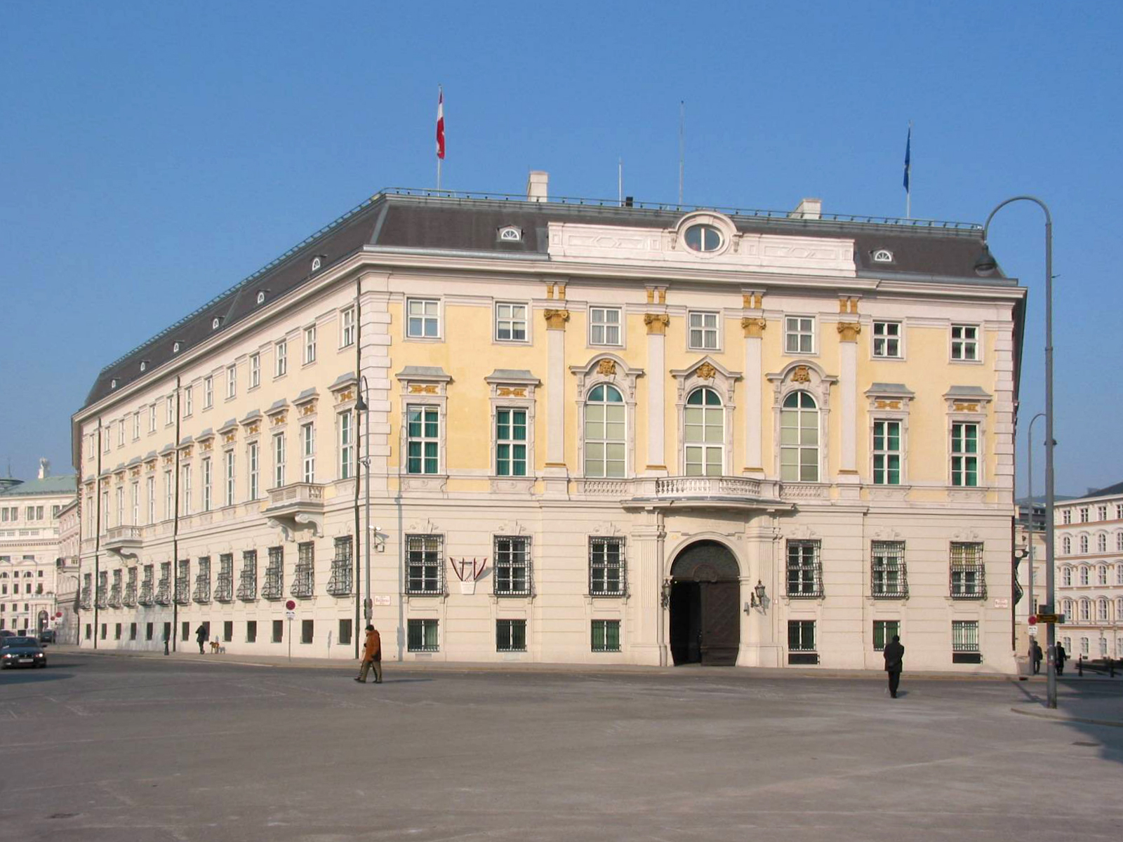 Bundeskanzleramt, Vienna I, 2006-01-28 selfmade photo